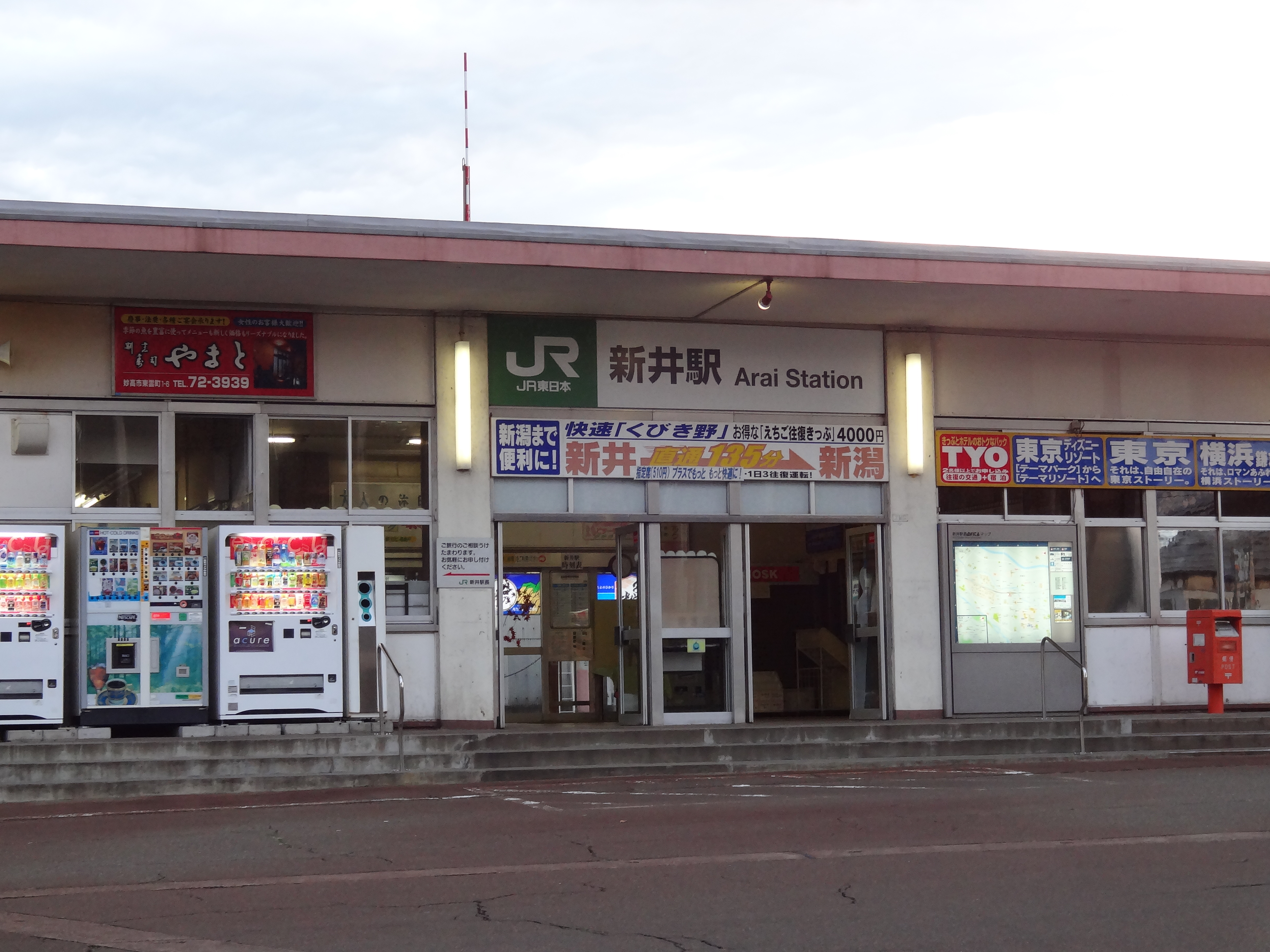 JR信越本線新井駅。駅舎入口。